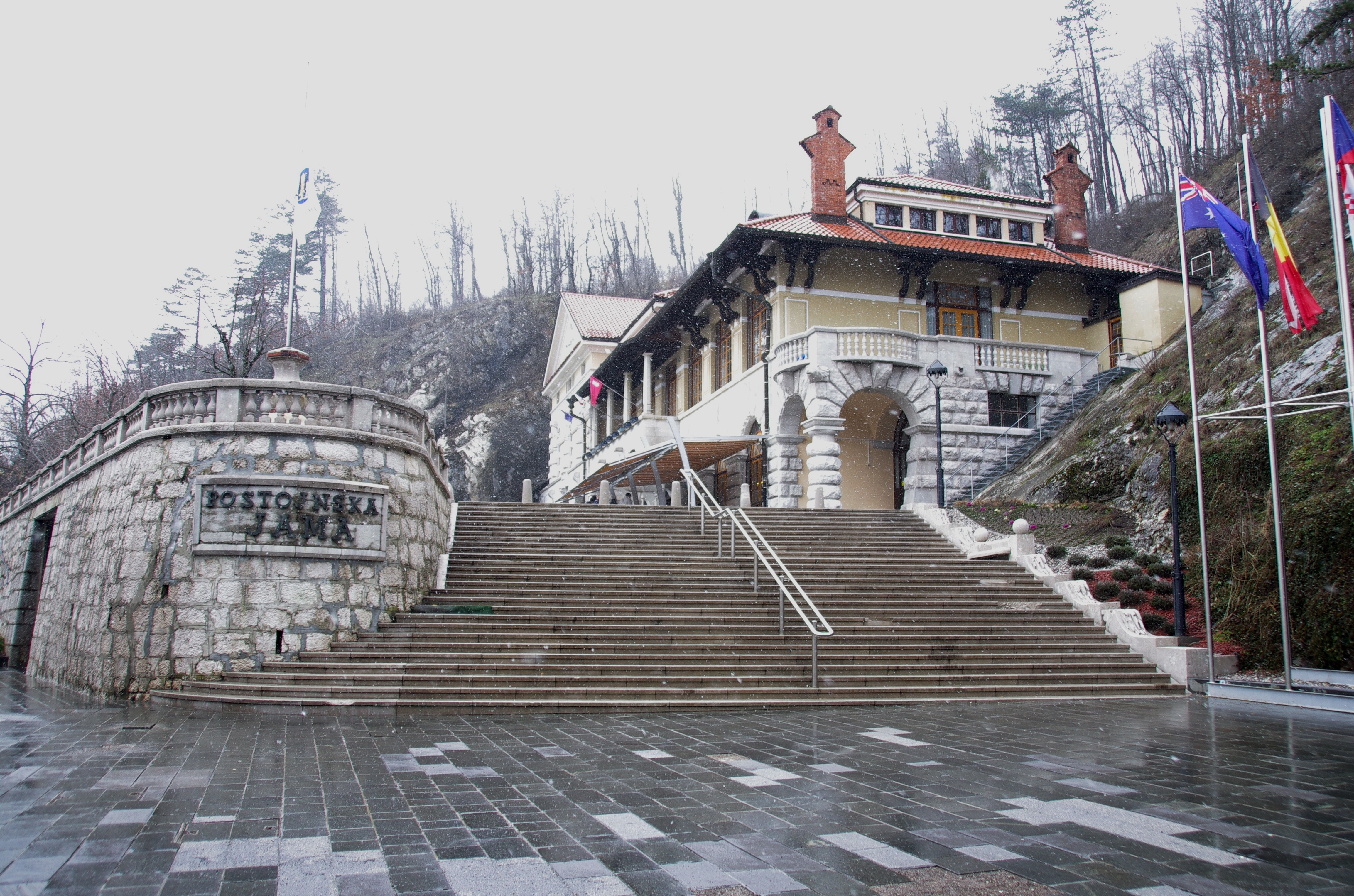 1.4.13 1 Postojna Cave 01